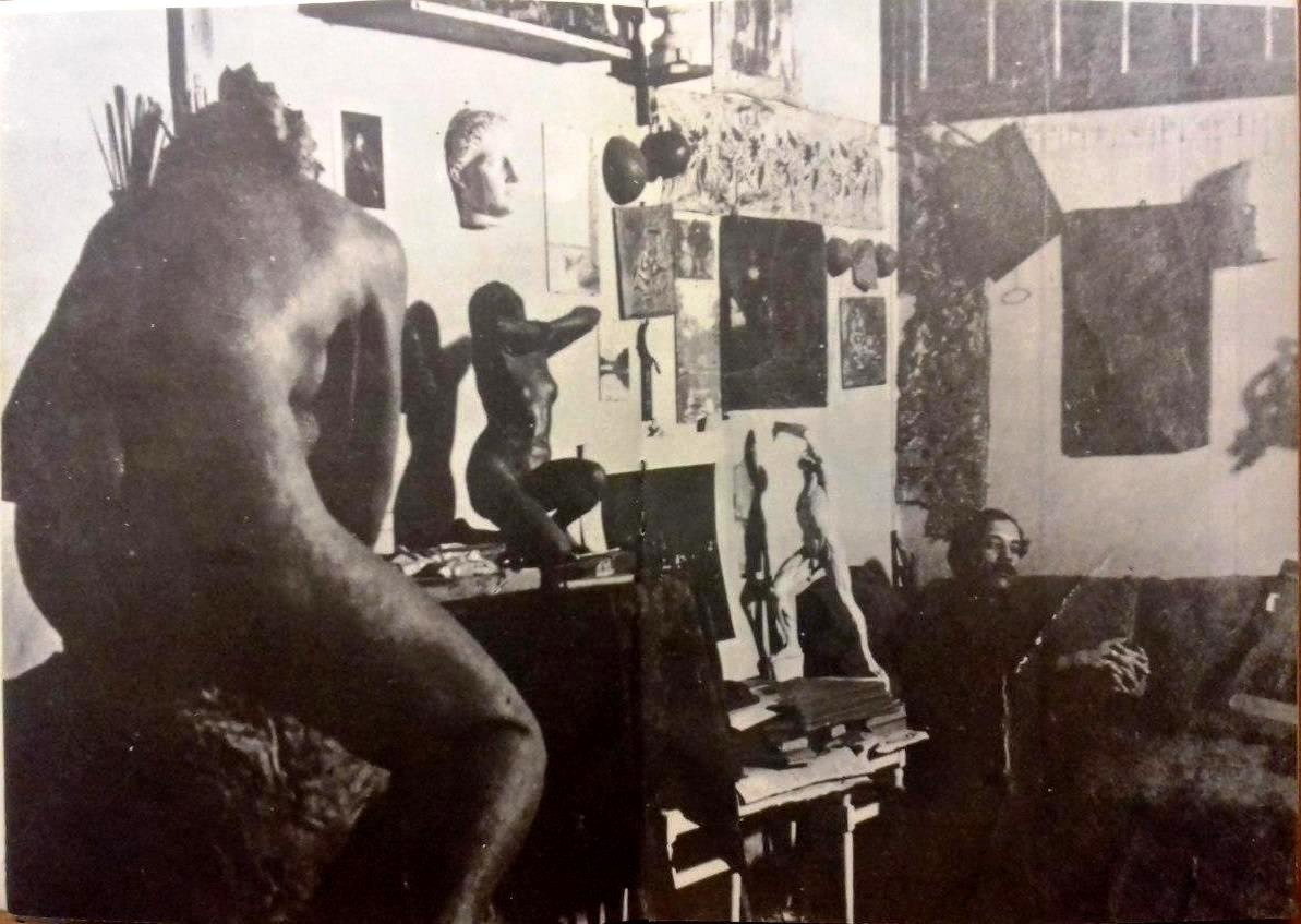 Pérez Mujica en su tallerjunto a algunas de sus obras